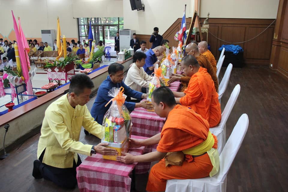 ถวายเทียน 61 ส.ว.